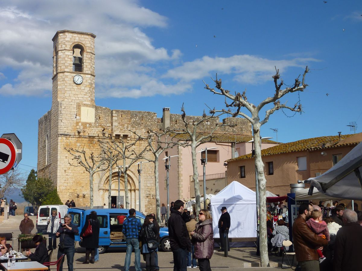 Església Parroquial de Sant Esteve de Vila-sacra